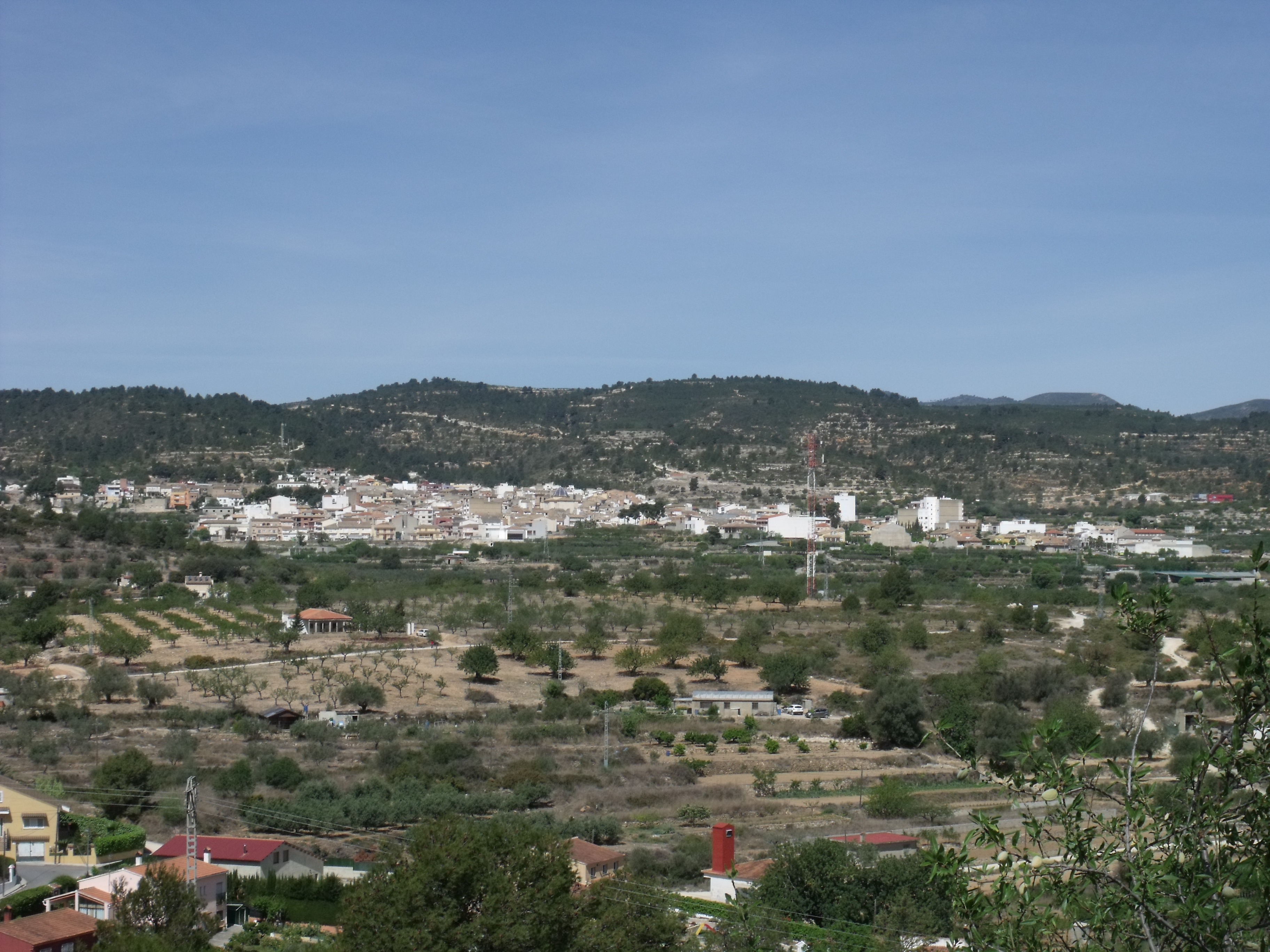 Yátova desde Macastre